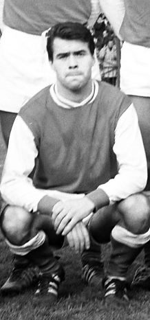 Stadium municipal de Toulouse, 1bis allées Gabriel-Biénès. 15 novembre 1964. Photo de groupe de l'équipe du Toulouse Football Club sur le terrain ; Accroupi : Edmond Baraffe.